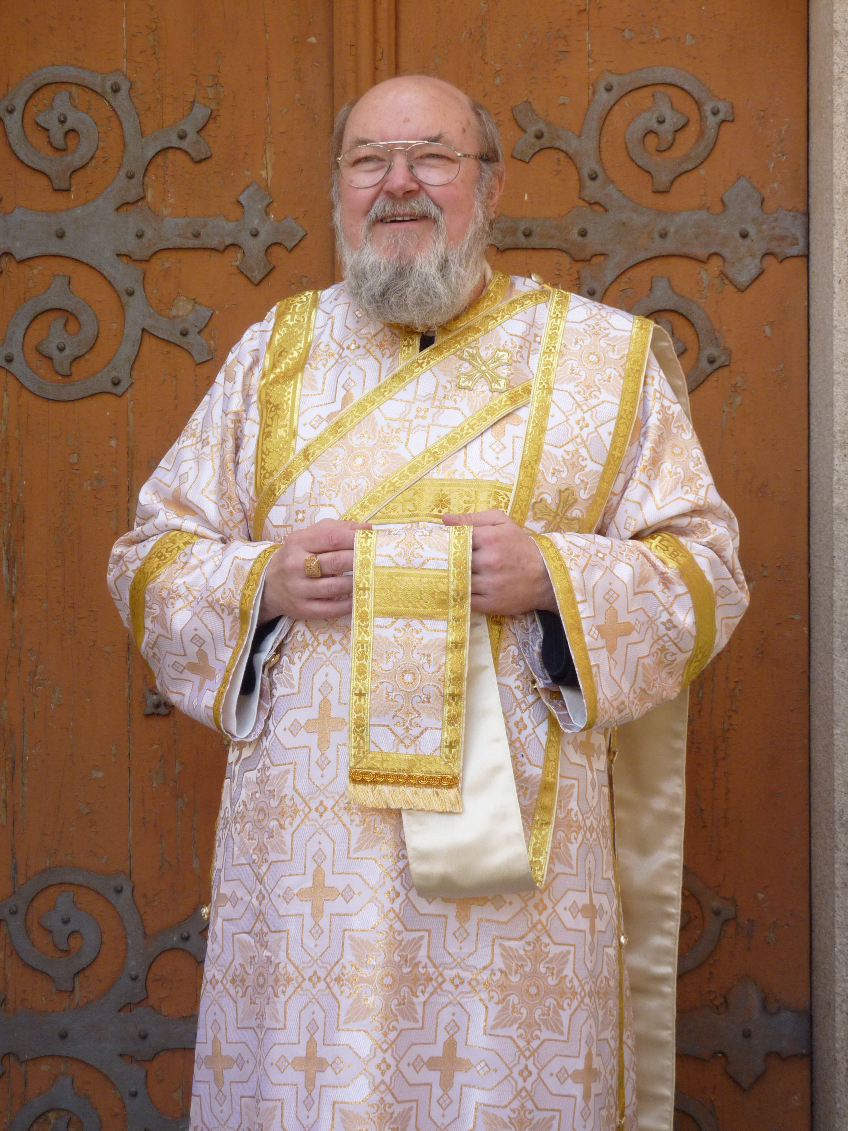 Jaroslav Maxmilián Kašparů před kostelem v Žirovnici.